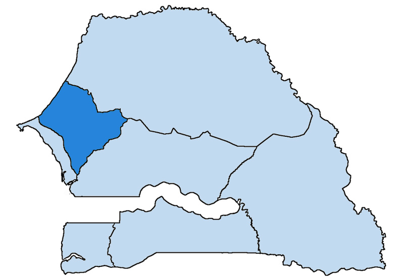 Mappa della diocesi cattolica di Thiès, in Senegal. Anno 2009.